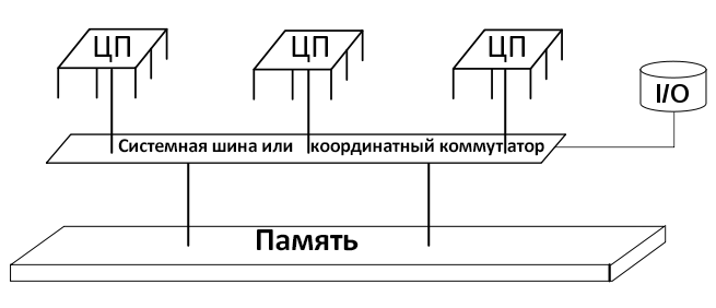 Наглядное представление разделяемой памяти